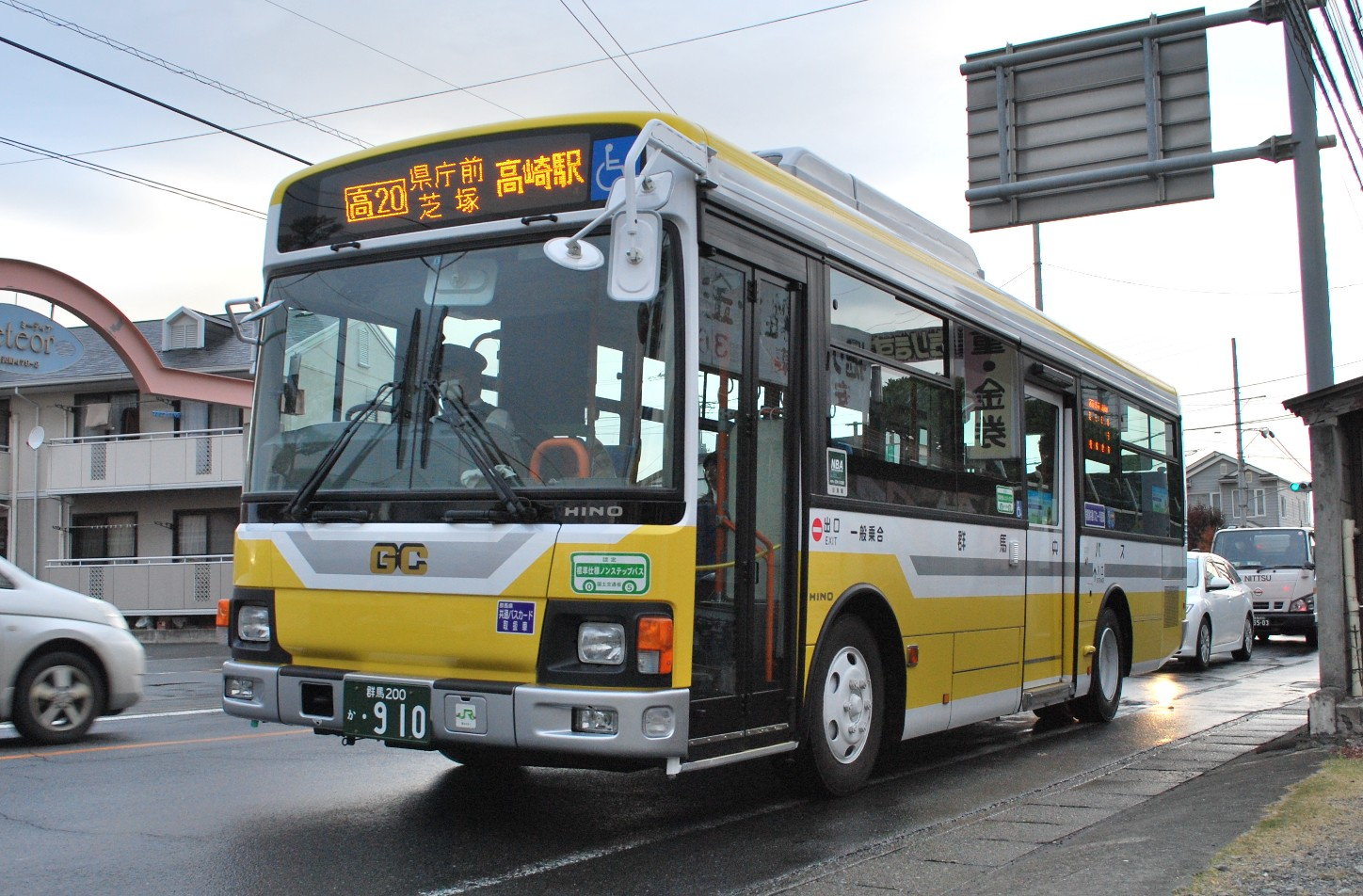 群馬中央バス（群馬200か910）。ラッピング広告、ボディ塗装広告のない群馬中央バスオリジナル塗装の車両。群馬県高崎市貝沢町の公道上で撮影。